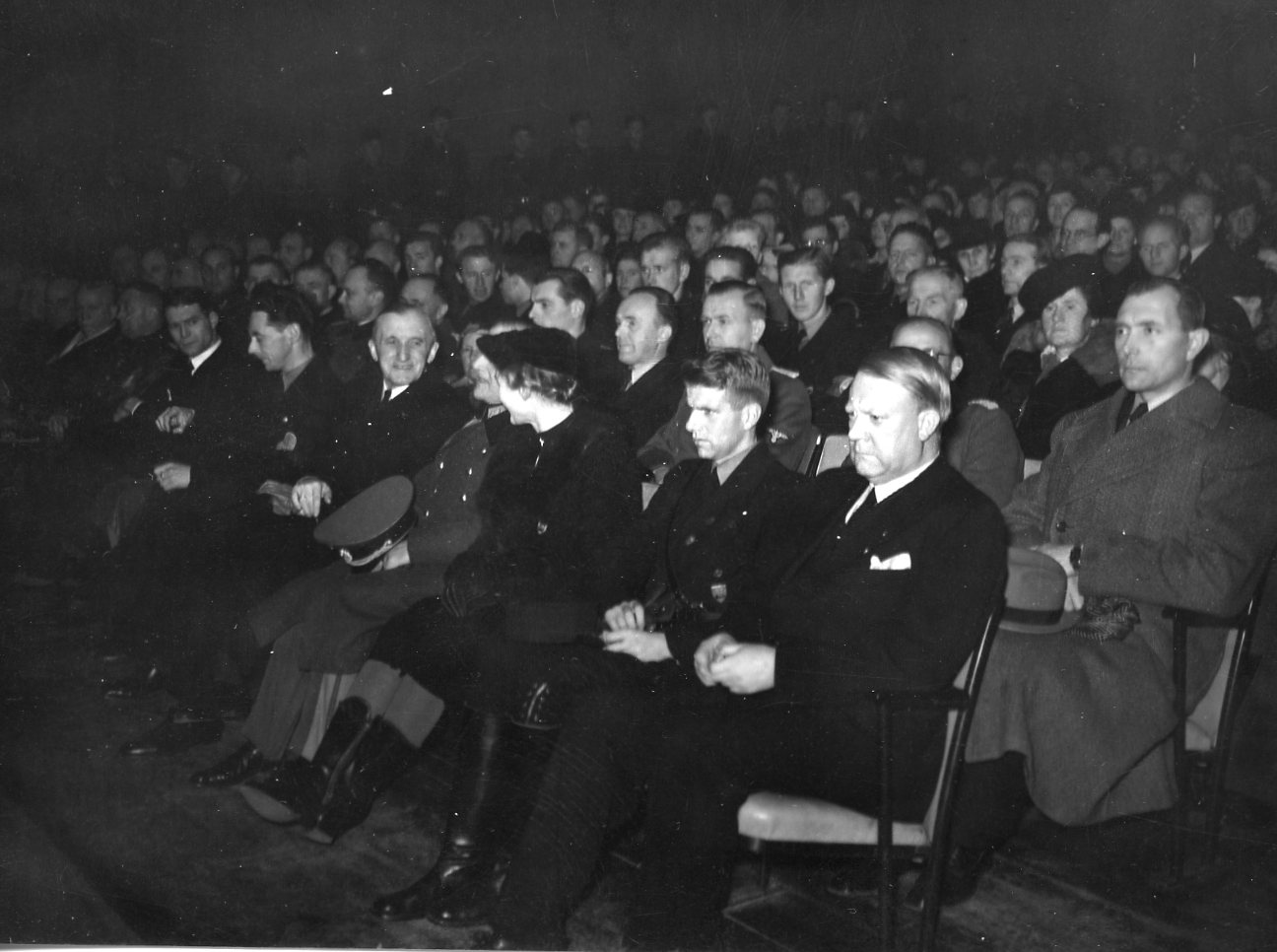 RA/RAFA-3309/U 38B/10/38-10-58 img159 Nasjonal Samling, forkortet NS, var et norsk politisk parti som ble grunnlagt av Vidkun Quisling i 1933 og ble oppløst ved frigjøringa i 1945. Ideologisk fulgte partiet den tyske nasjonalsosialismen tett, og NS ble støtteorganisasjon for den tyske okkupasjonsmakta i Norge under andre verdenskrig.